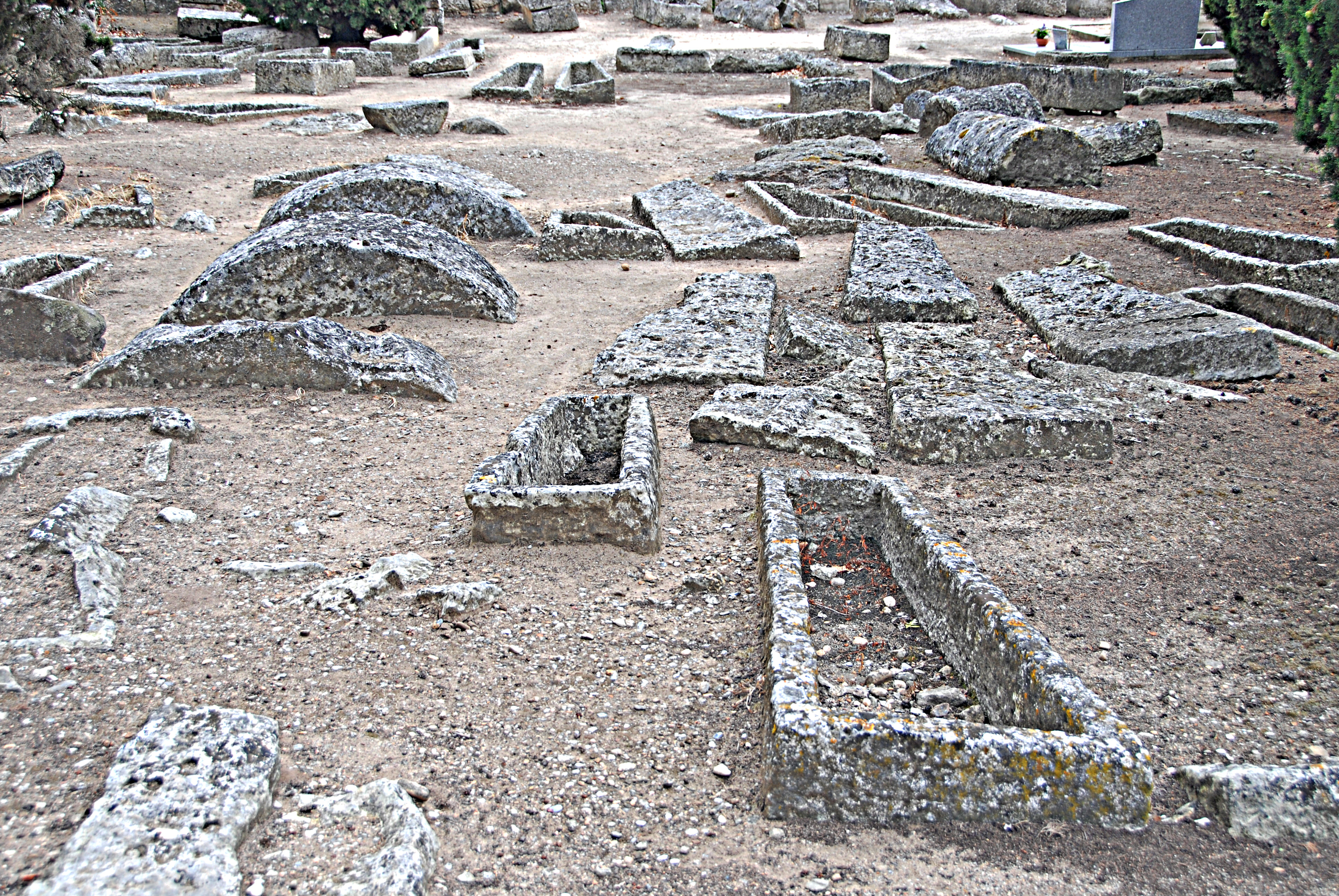 Civaux, Nekropole, Sarkophage, teils gerundet